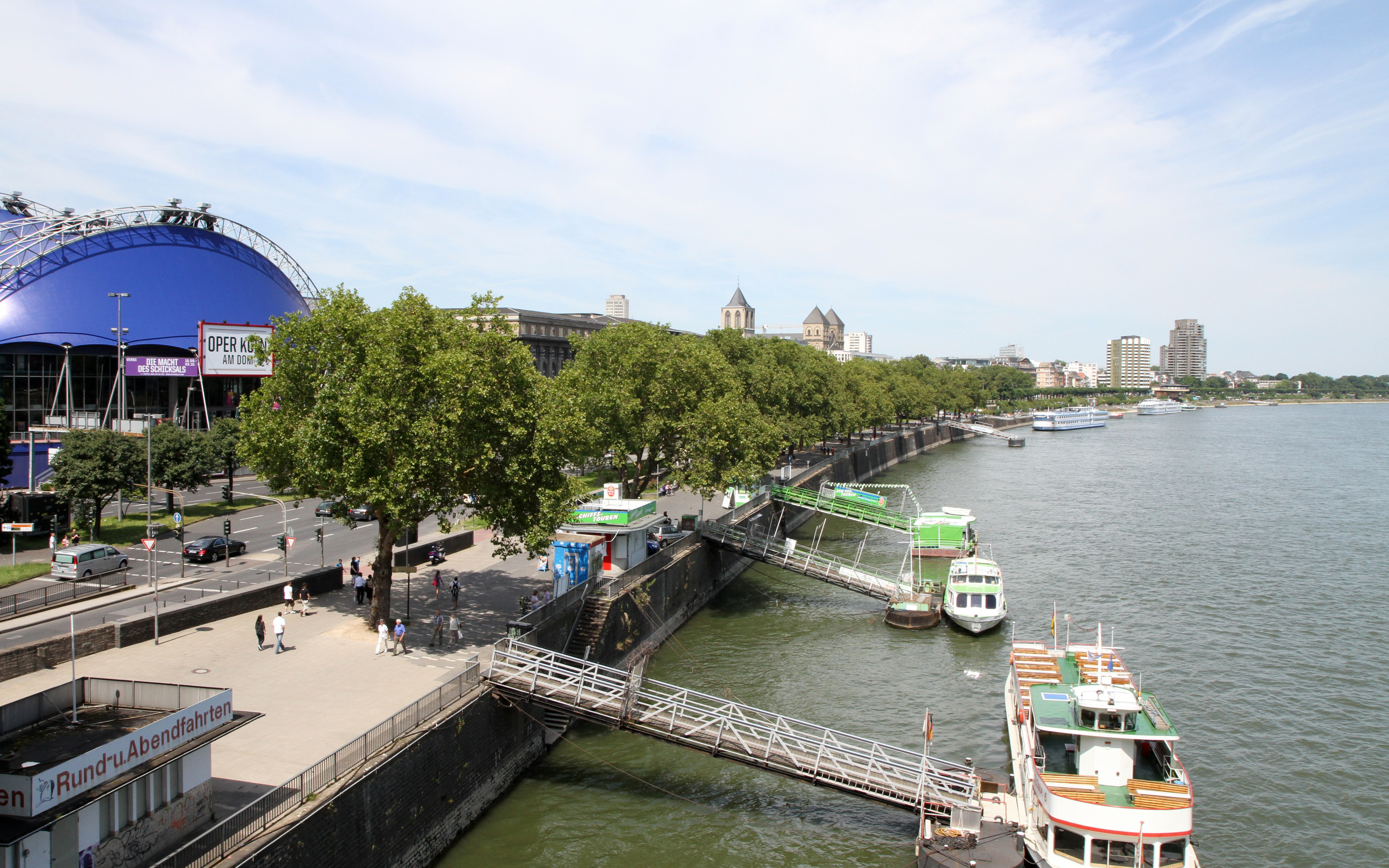 Köln-Altstadt-Nord, Allee Konrad-Adenauer-Ufer